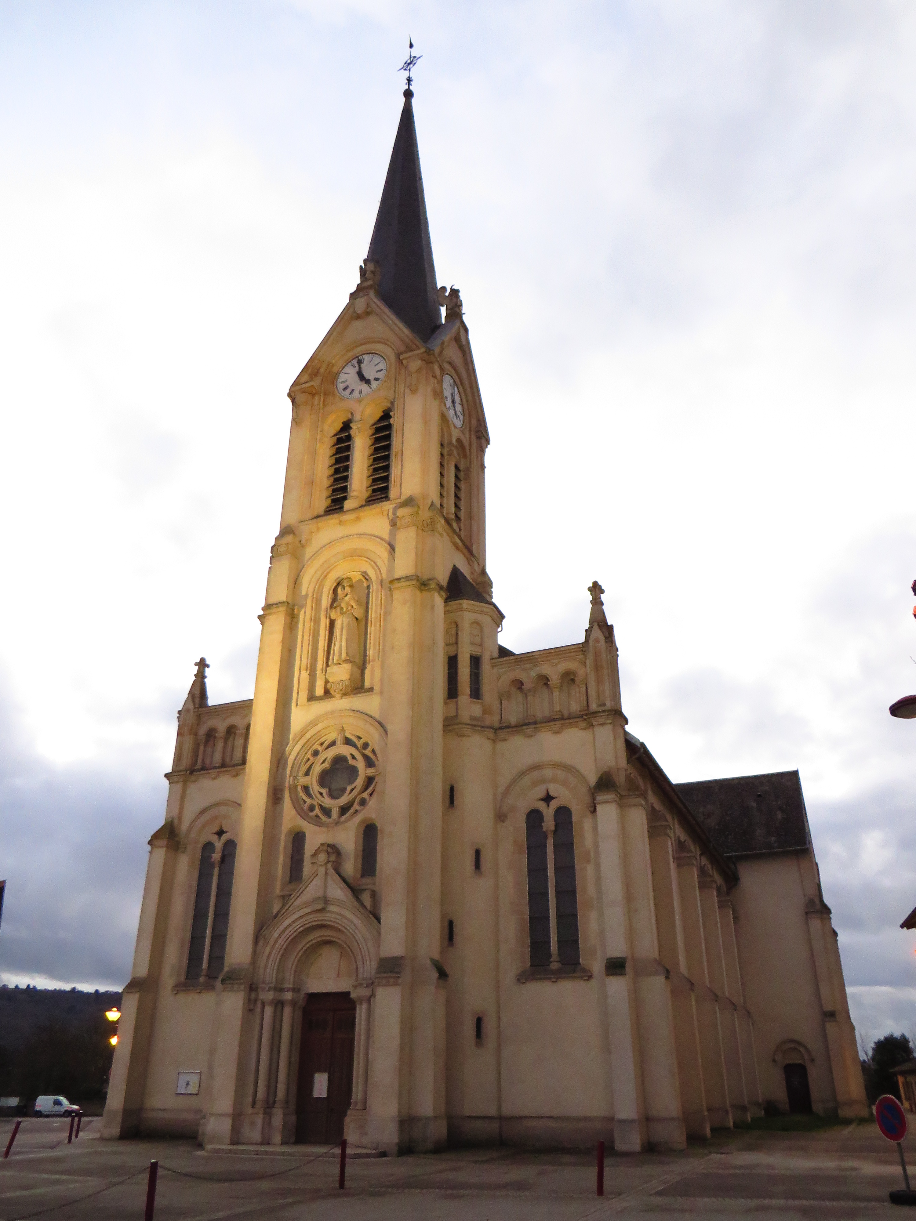 Neuves Maison eglise